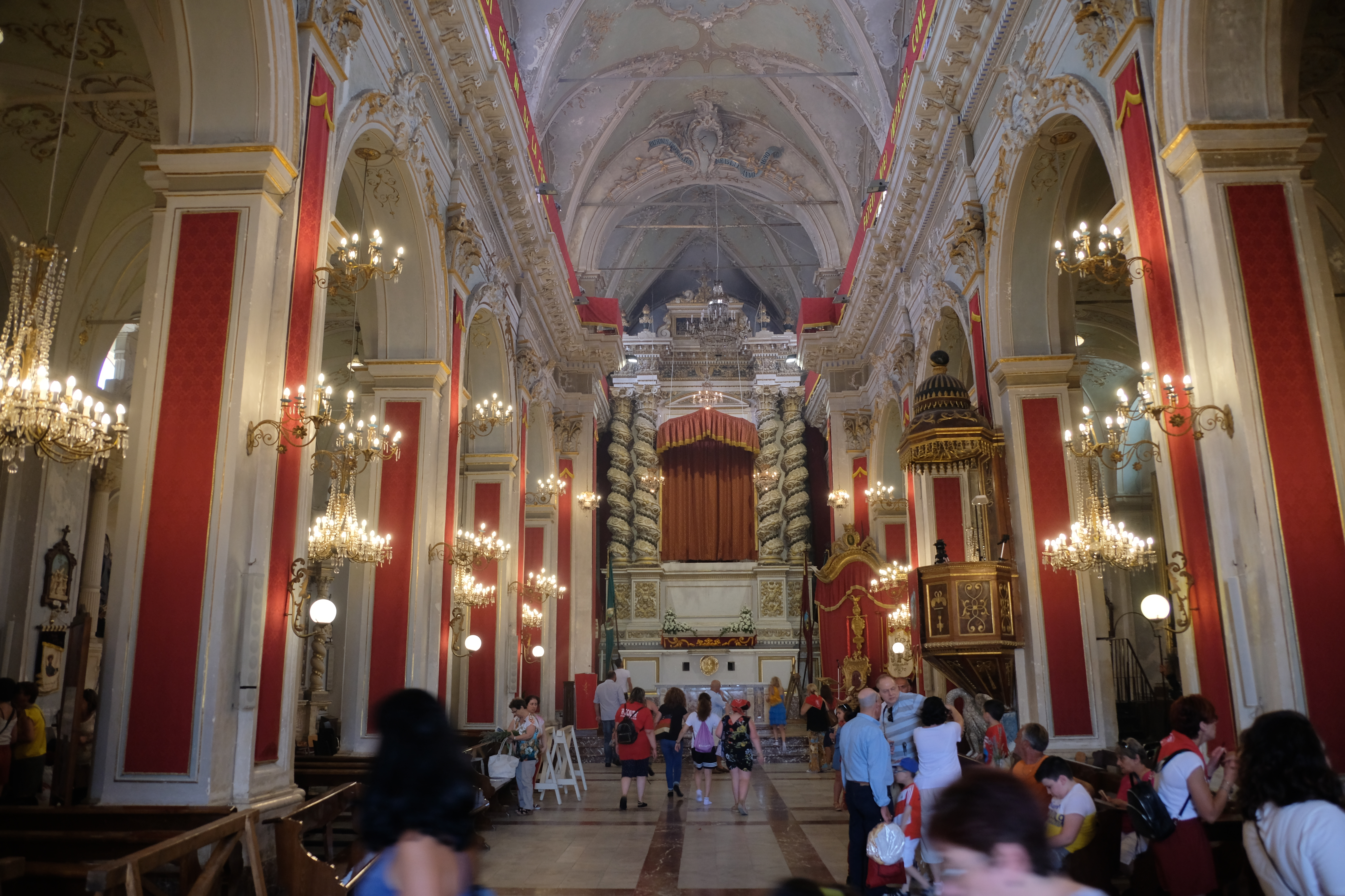 Interni chiesa di San Paolo durante la festa